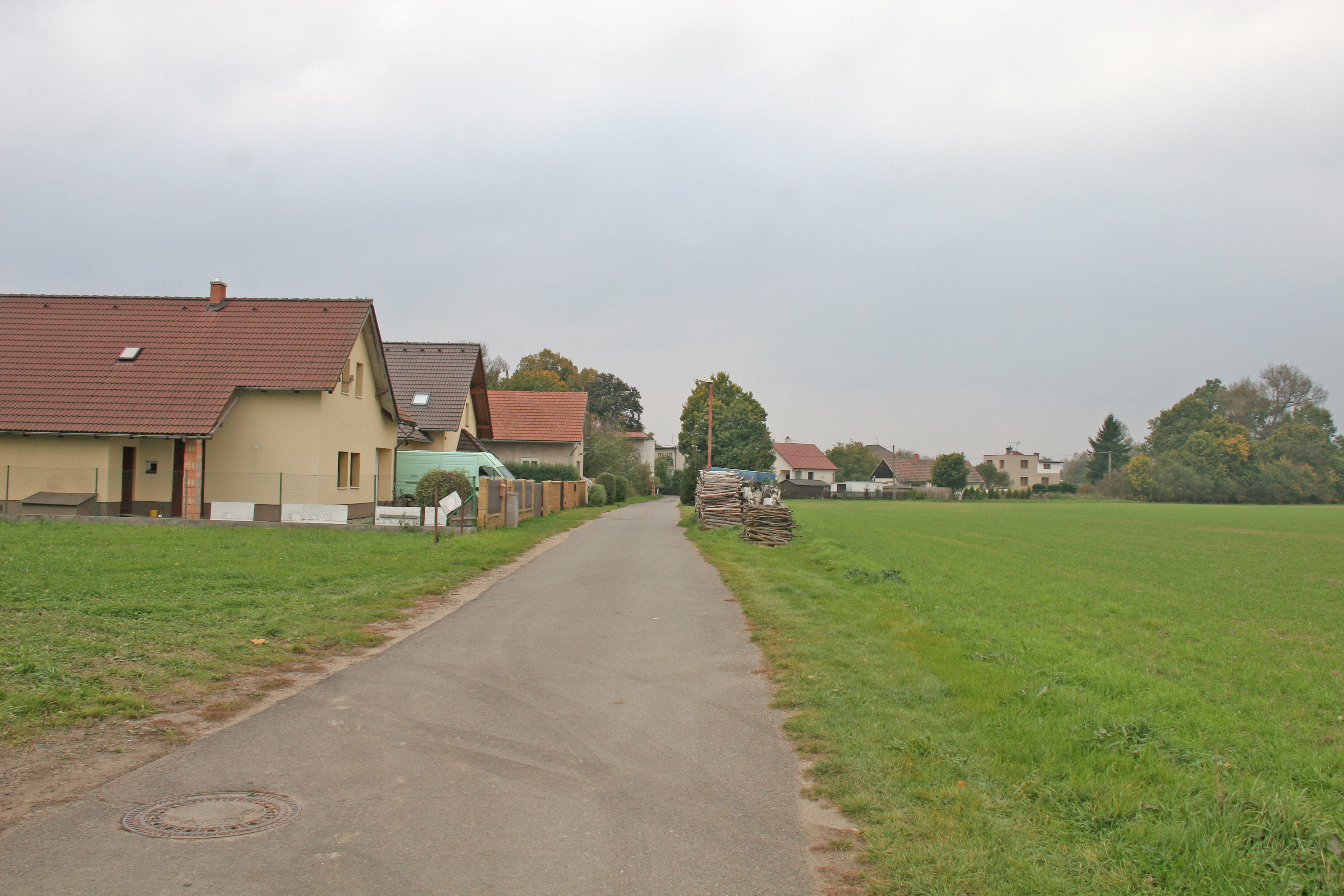 Nepasice